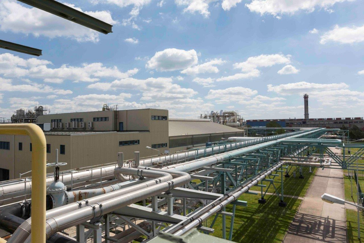 Ein verzweigtes Rohrbrückensystem vernetzt die ansässigen Unternehmen. Im Vordergrund Akzo Nobel Industrial Chemicals GmbH